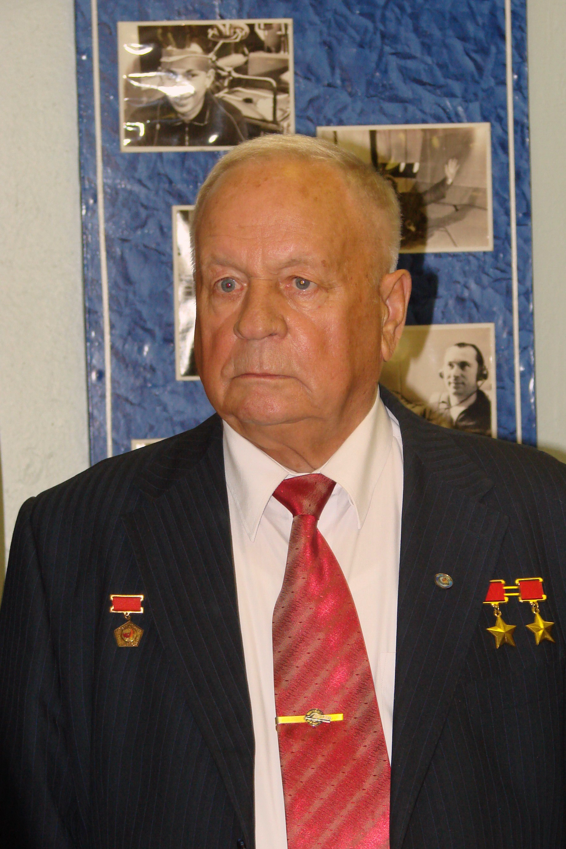 Дважды Герой Советского Союза космонавт Горбатко Виктор Васильевич в Вологде на одном из праздничных мероприятий в честь 50-летия полета Юрия Гагарина в космос.